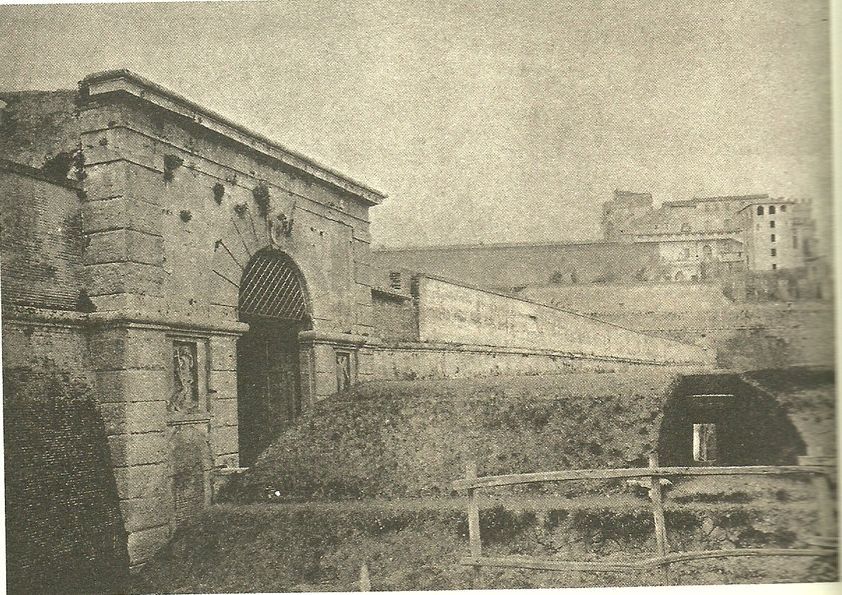 Immagine di Porta Angelica risalente al XIX secolo.